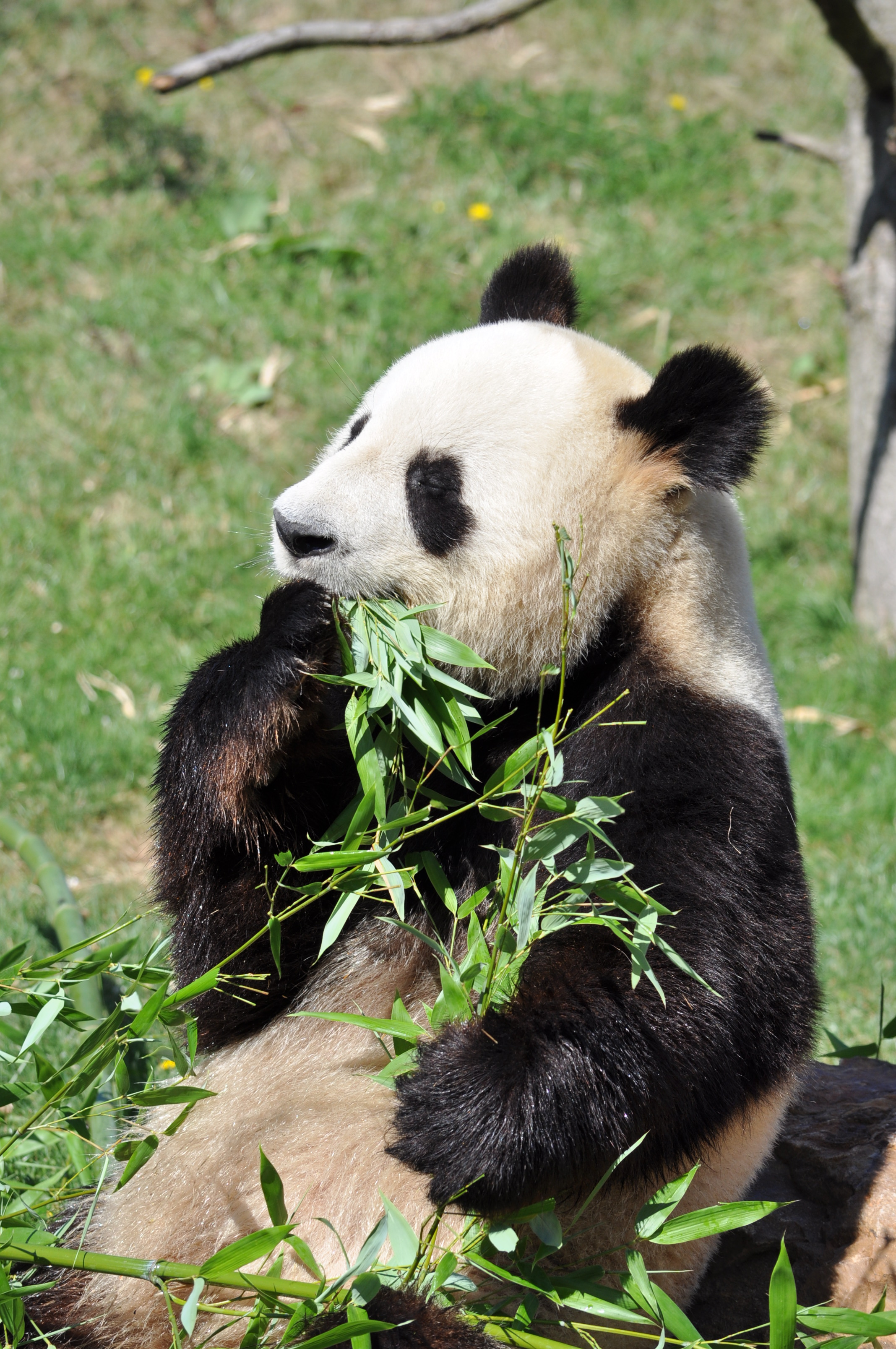 panda mâle du zoo de Beauval